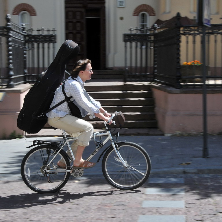 Didžioji g. Vilnius